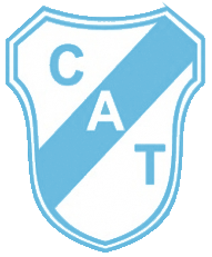 Logo: Club Atlético Temperley